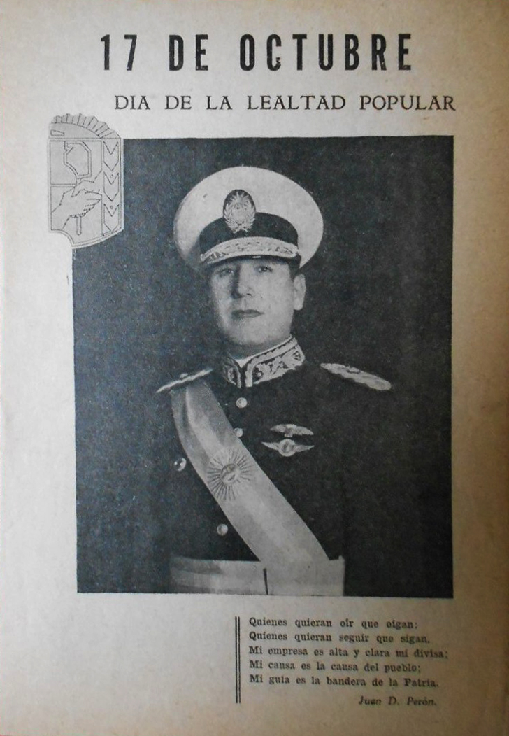 Afiche publicado en conmemoración al primera aniversario del Día de la Lealtad